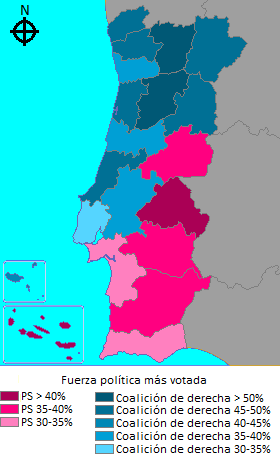 Resultados por distrito do PS e da coligação PSD-CDS nas eleições legislativas de 2015.